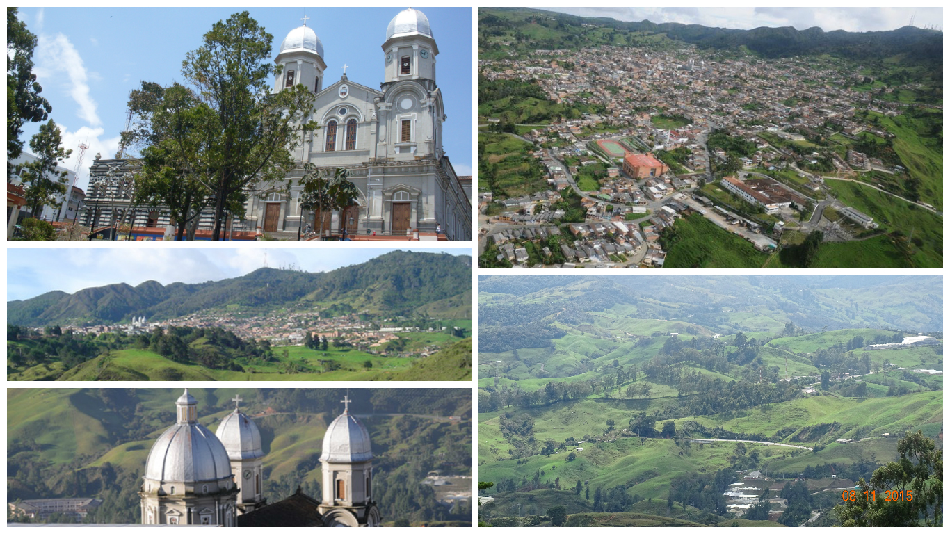 Fotografías de Yarumal Antioquia